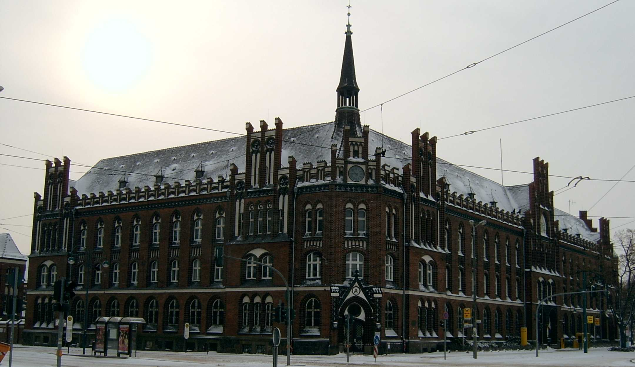 Postgebäude in Frankfurt (Oder).